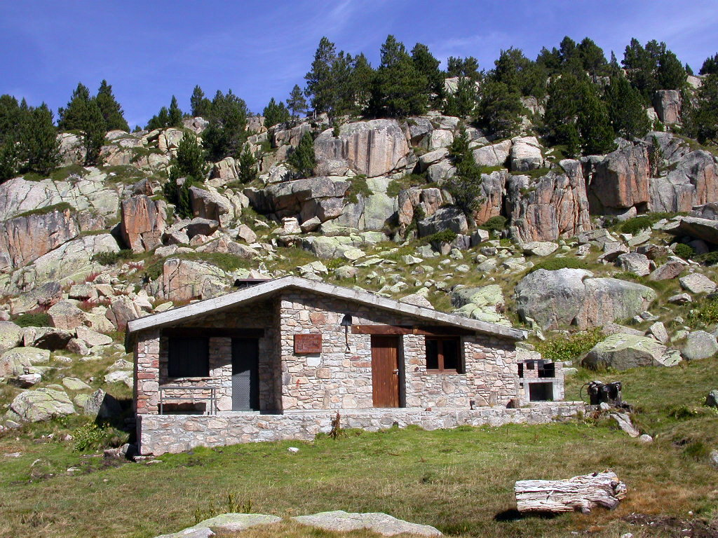 Refuges Andorre Refugi d'Ensagents